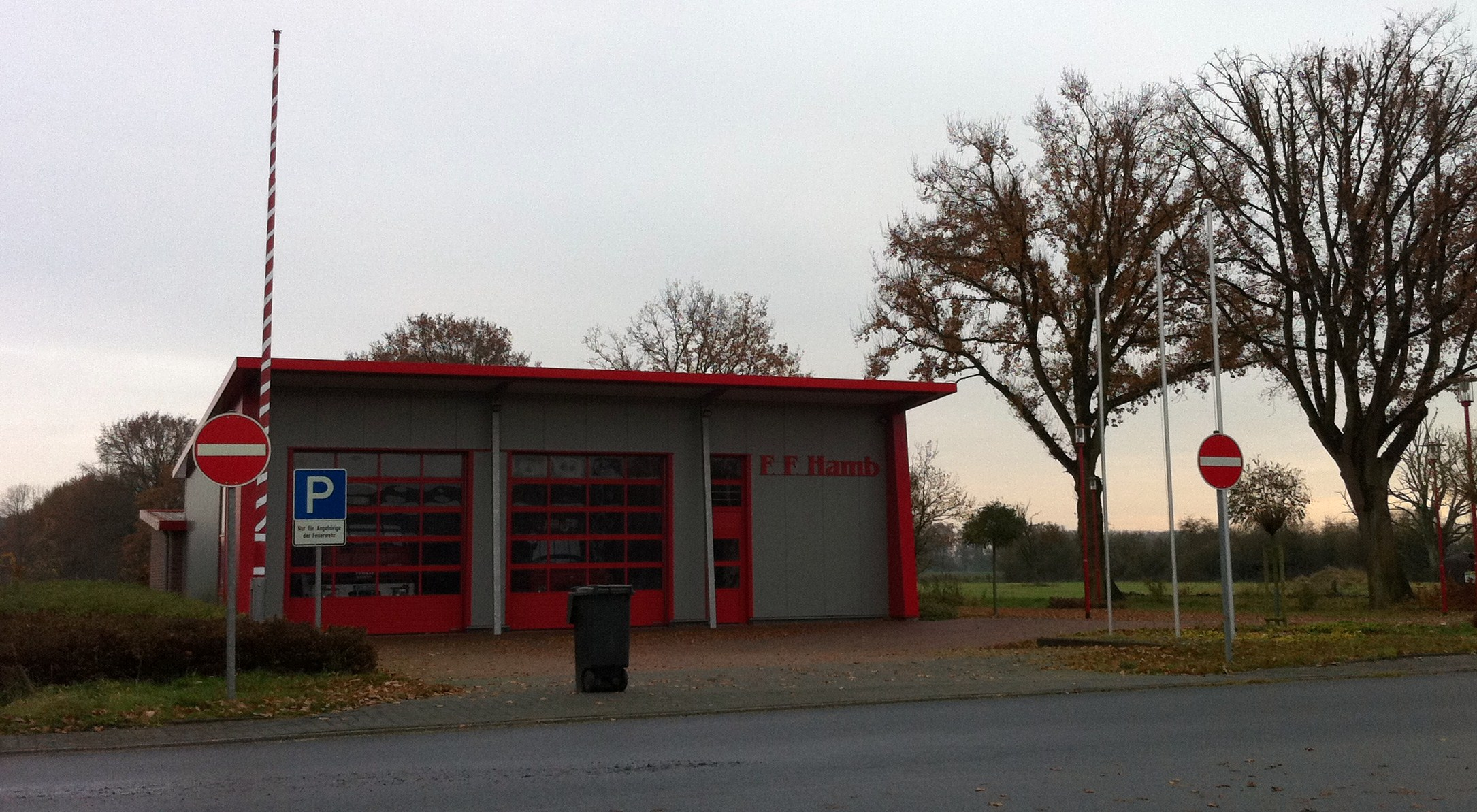 Gerätehaus der Feuerwehr Löschzug.2 Hamb